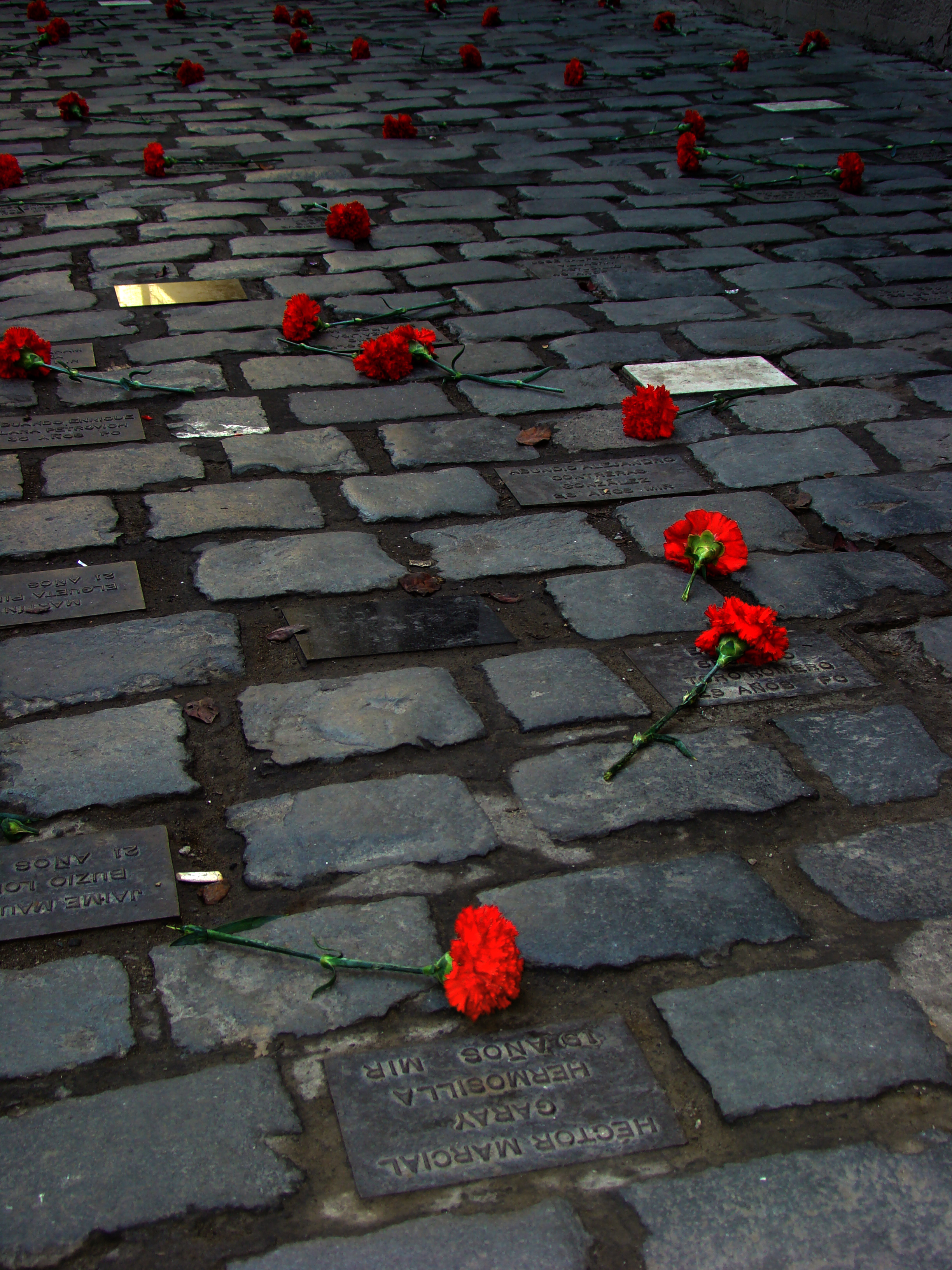 Calles París Londres This is a photo of a national monument in Chile: 235